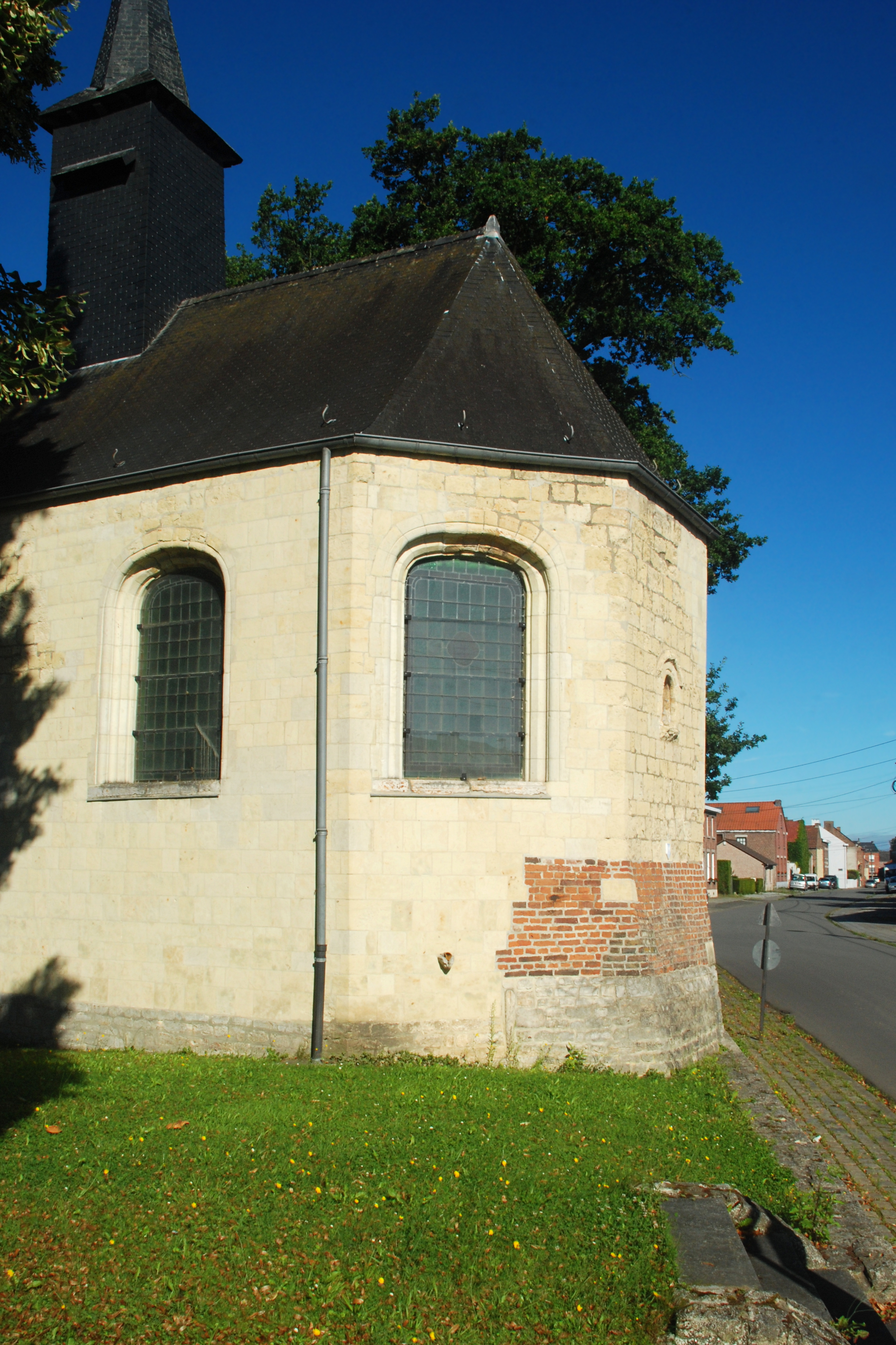 Belgique - Brabant wallon - Hélécine - Linsmeau - Chapelle Notre-Dame de la Colombe